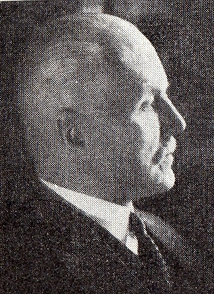 Suomalainen kirjakustantaja Alvar Renqvist (1868-1947).